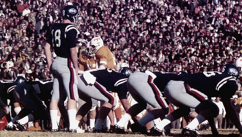 Ole Miss Rebels versus Tennessee Volunteers in 1969. Archie Manning is the Ole Miss quarterback.